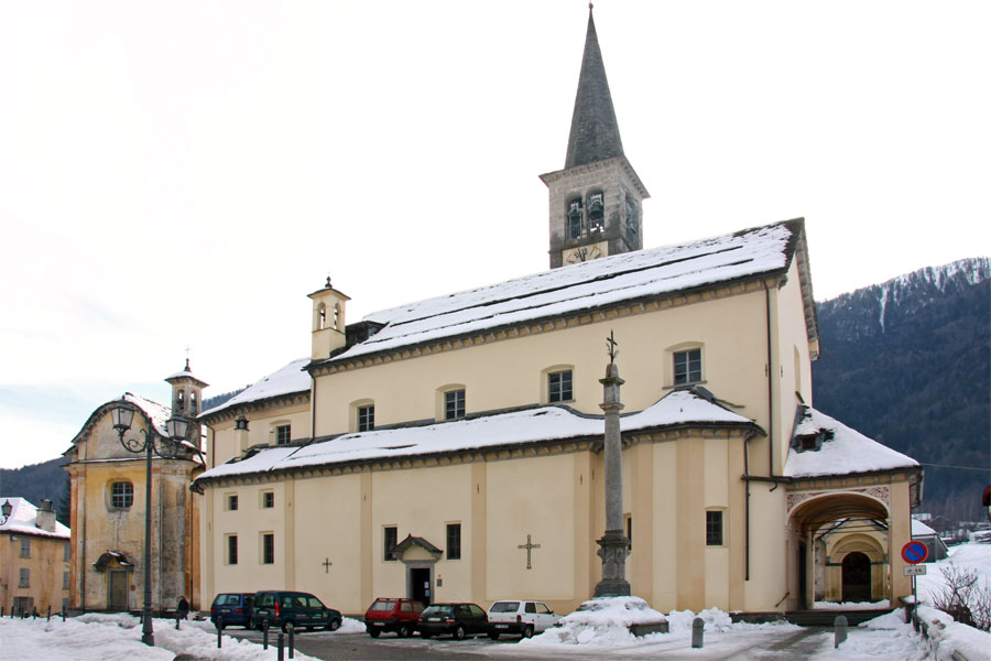 Chiesa parrocchiale di Malesco (VB)